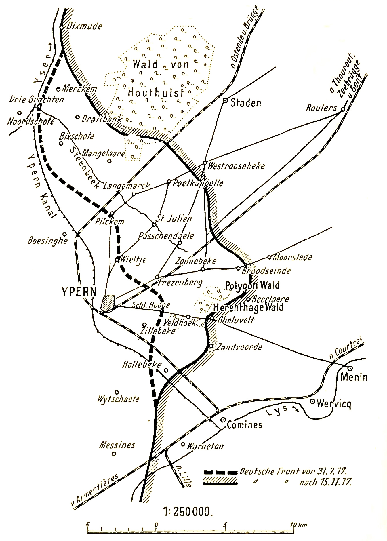 Abwehrschlachten Flandern, August bis November 1917